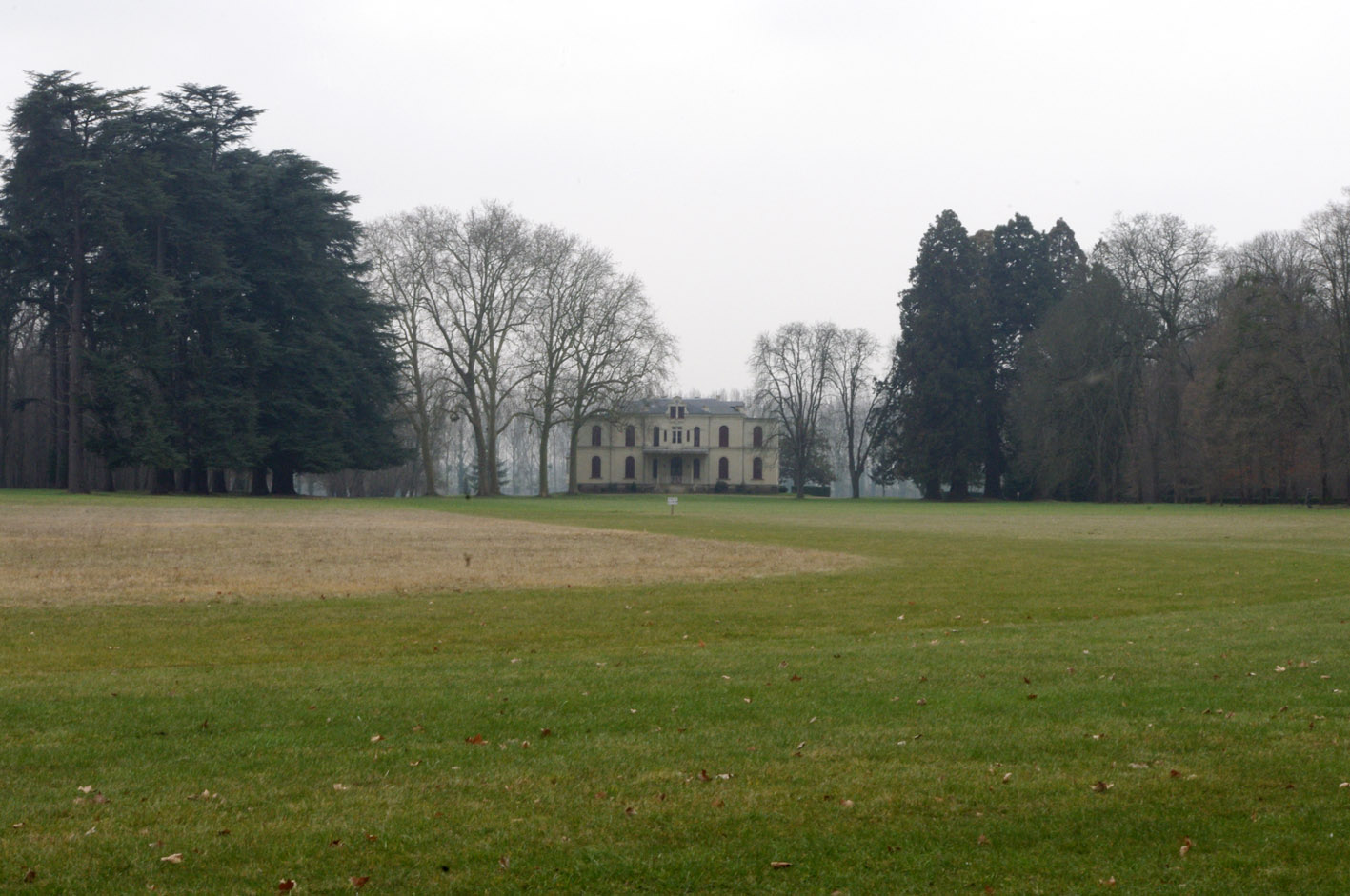 Bâtiment appelé "le Petit Château" construit en 1877 dans le parc de l'ancien château du Cardinal de Richelieu (Indre-et-Loire).